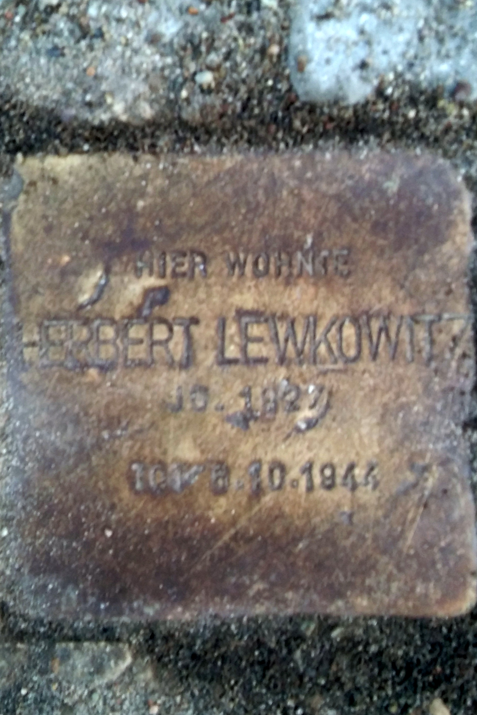 Stralsund, Sarnowstraße 26, Stolperstein Herbert Lewkowitz